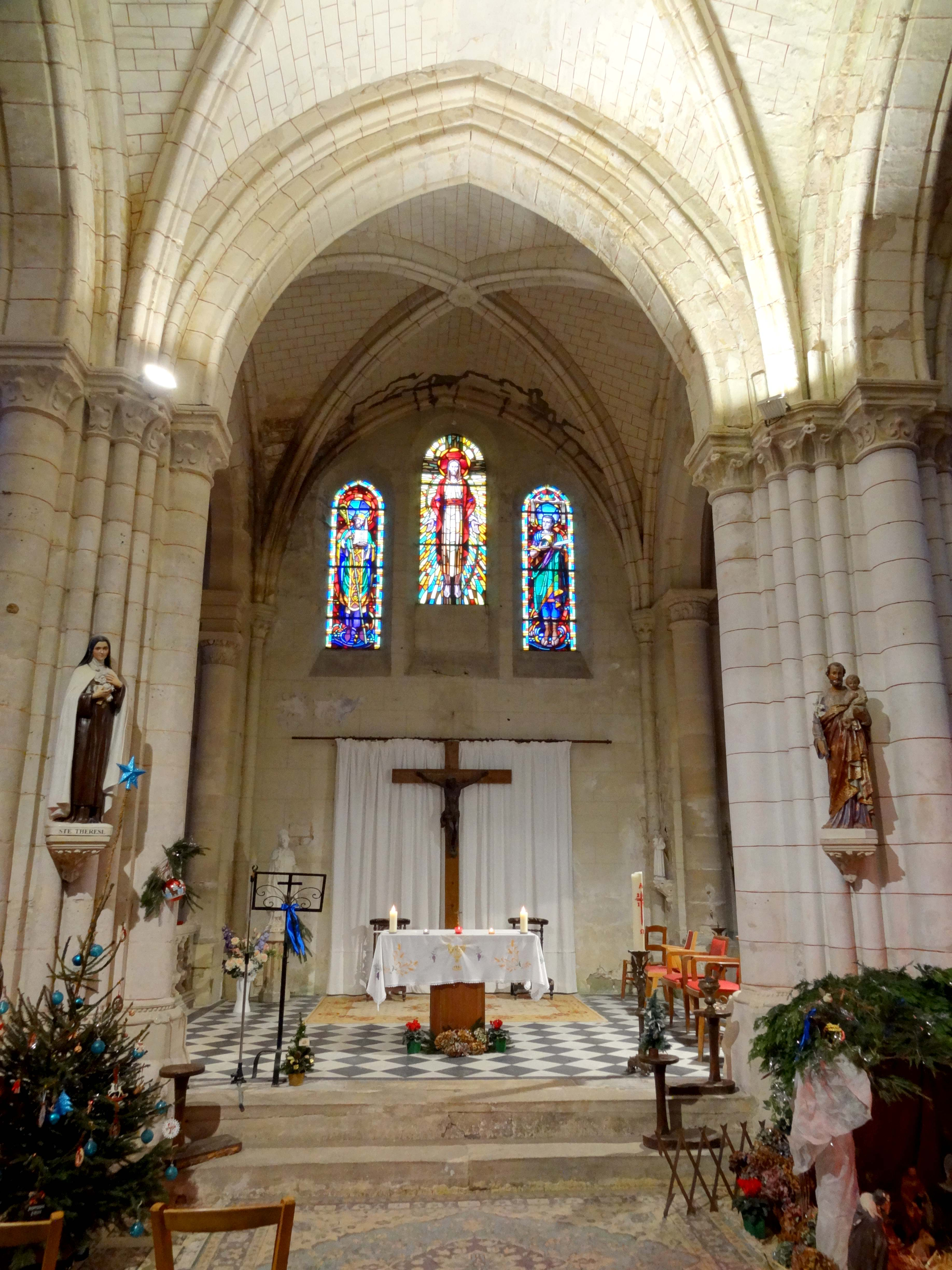 Intérieur de l'église - voir titre.